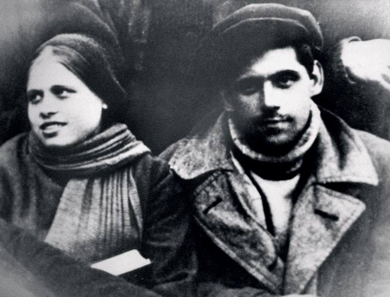 Родители Алисы Фрейндлих, 1930-е годы